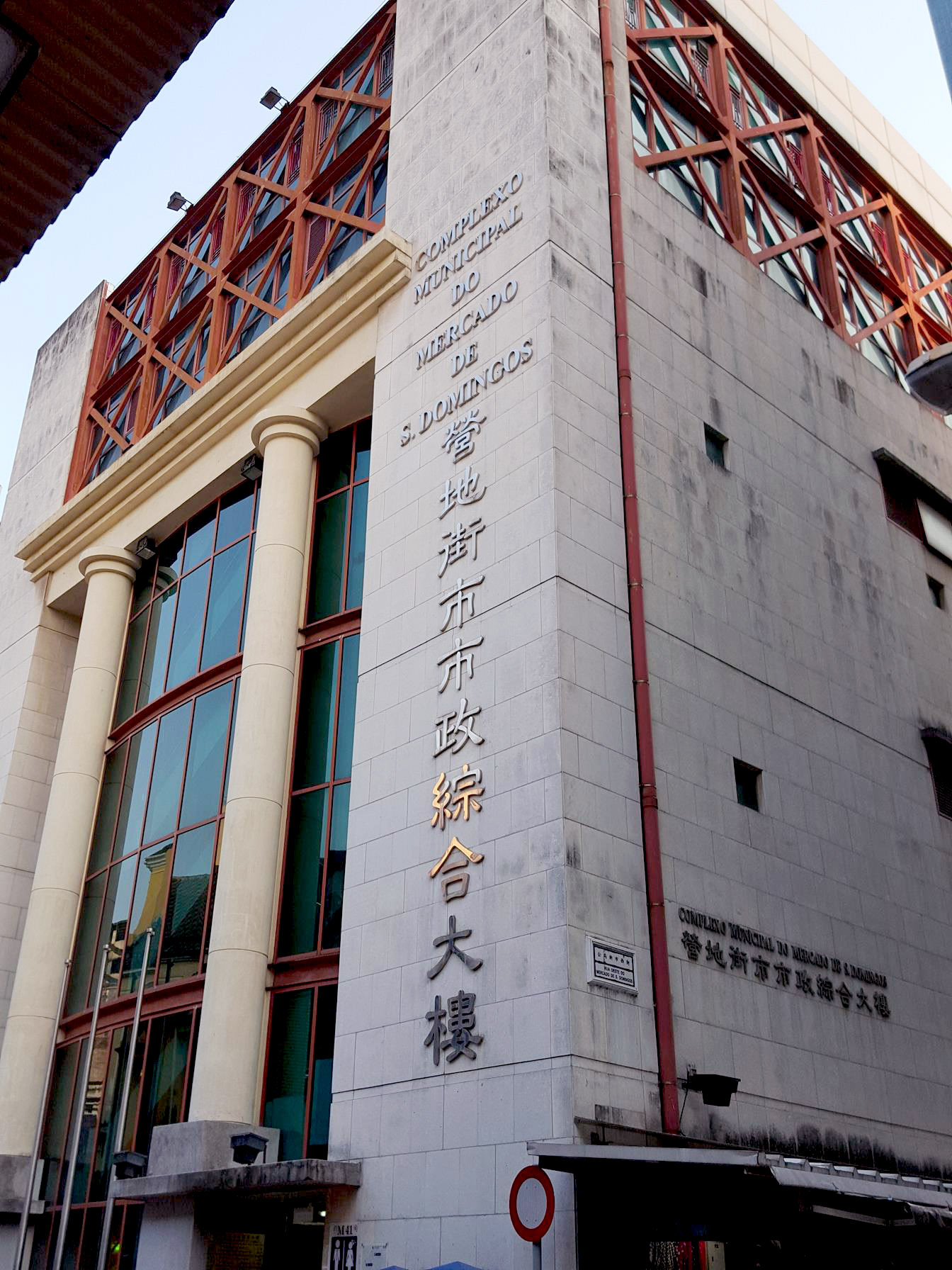 Complexo Municipal do Mercado de S. Domingos